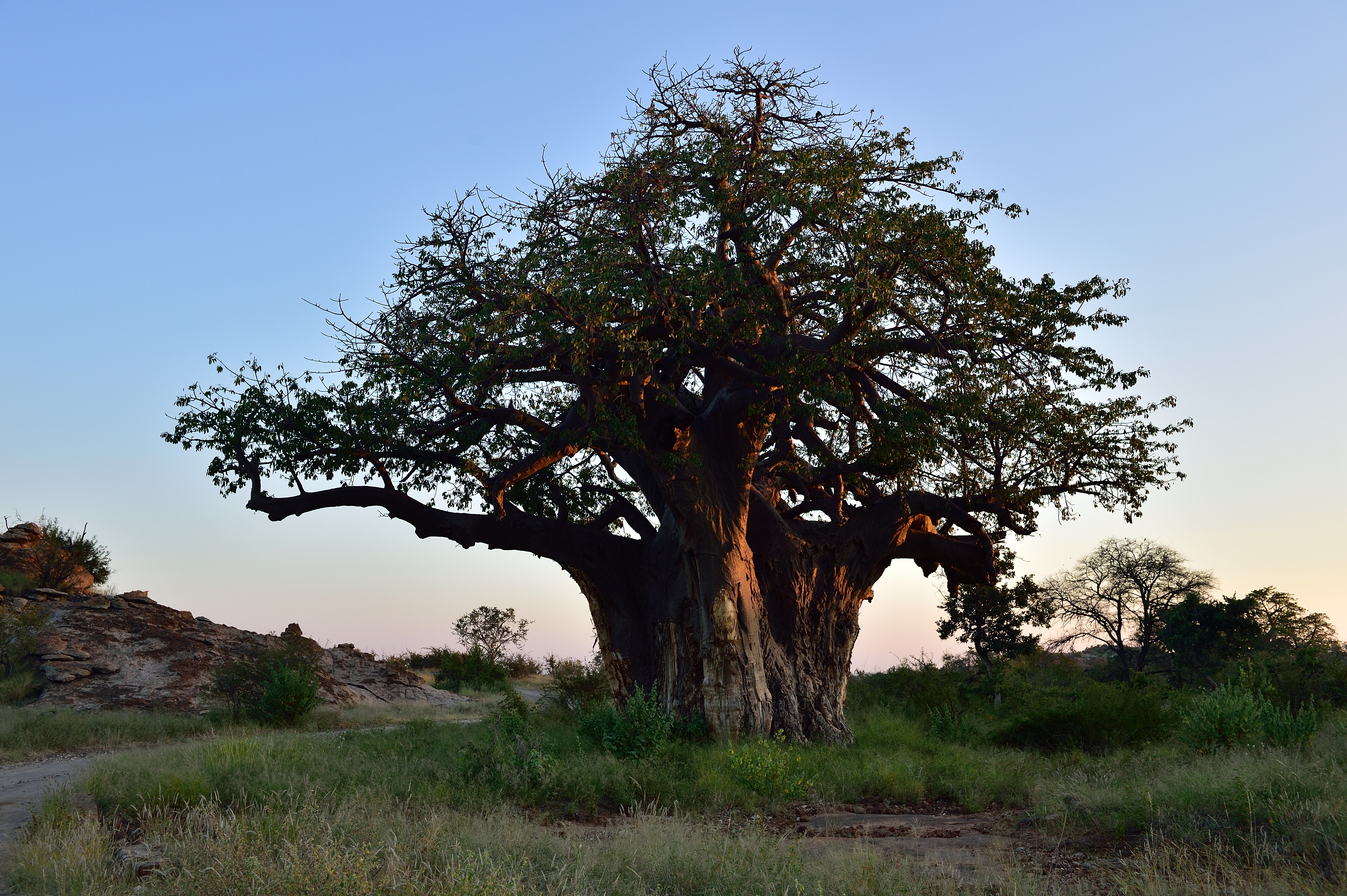 Vue du Limpopo en Afrique du Sud.